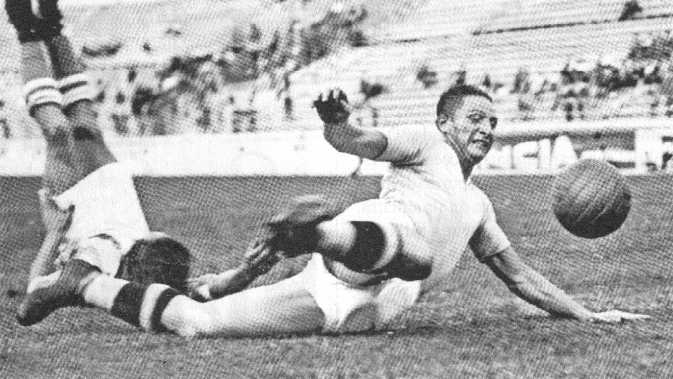 Il calciatore italiano Silvio Piola in azione alla Lazio nel 1937.